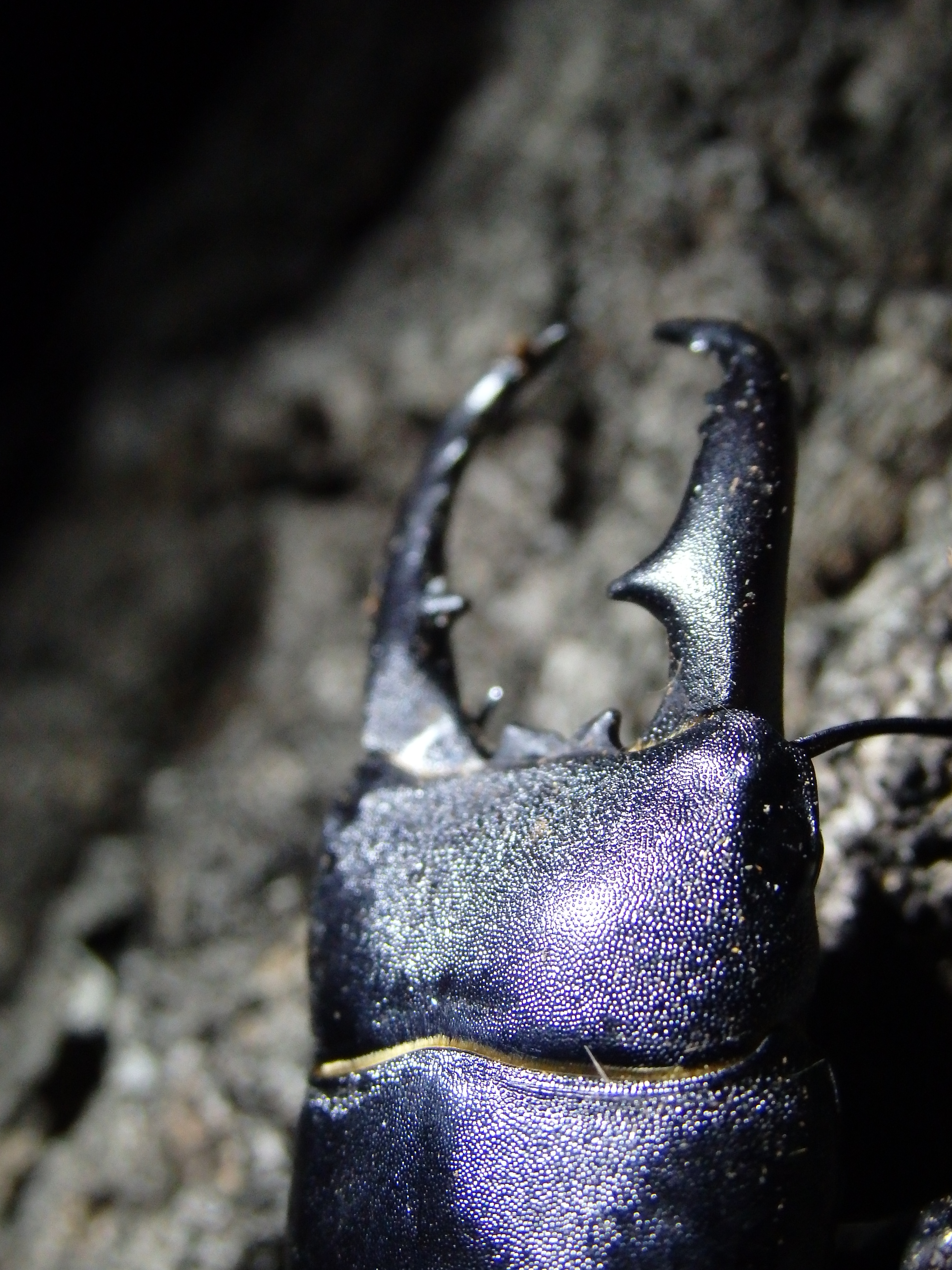 ヒラタクワガタ ♂の大あご